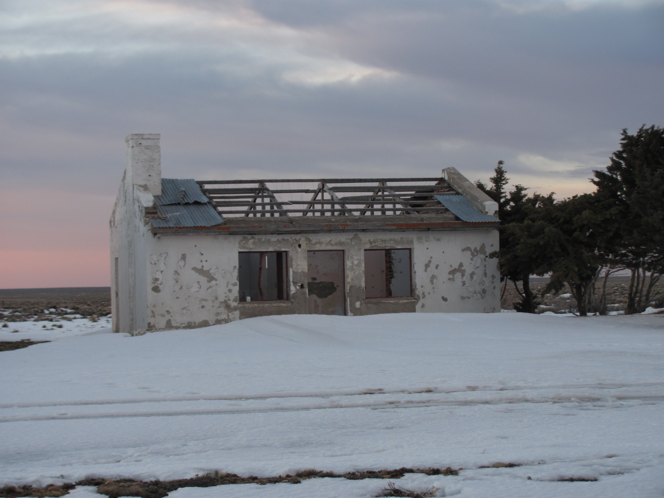 Vista de un edificio destruido en la zona de la estación Holdich